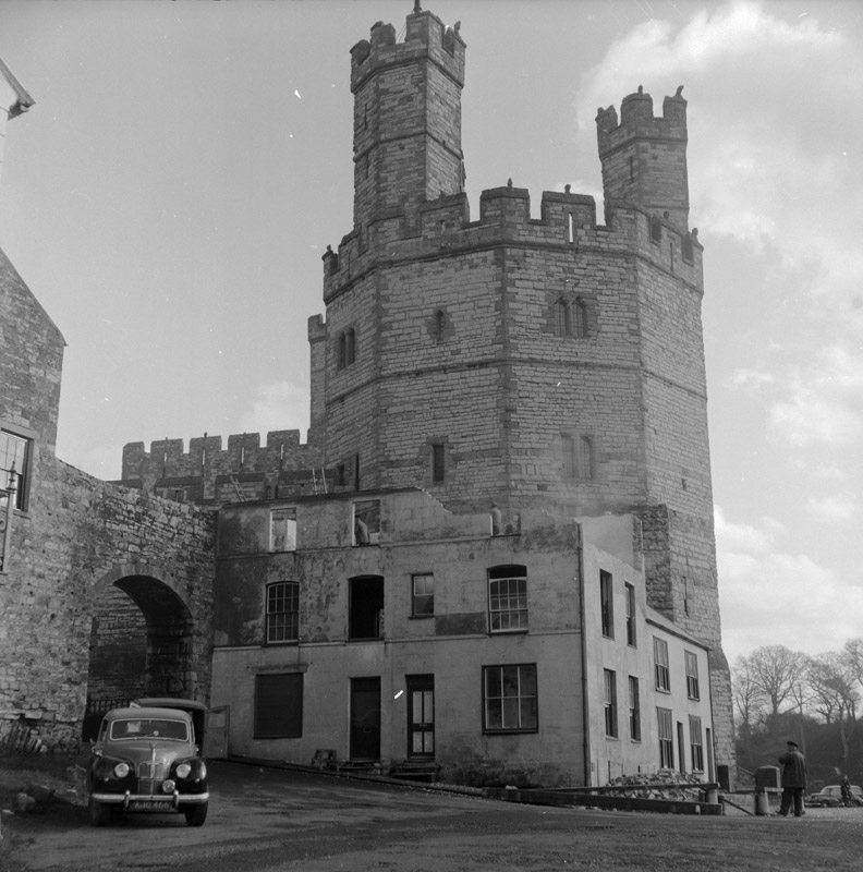 Teitl Cymraeg/Welsh title: Gwaith i ddymchwel adeiladau o amgylch Castell Caernarfon. Ffotograffydd/Photographer: Geoff Charles (1909-2002) Dyddiad/Date: 01/02/1959 Cyfrwng/Medium: Negydd ffilm / Film negative Cyfeiriad/Reference: (gch20009) Rhif cofnod / Record no.: 3470194 Rhagor o wybodaeth am gasgliad Geoff Charles yn Llyfrgell Genedlaethol Cymru More information about the Geoff Charles Collection at the National Library of Wales Mae ffotograffau Geoff Charles hefyd yn rhan o Broject Europeana Libraries Geoff Charles' photographs also form part of the Europeana Libraries Project